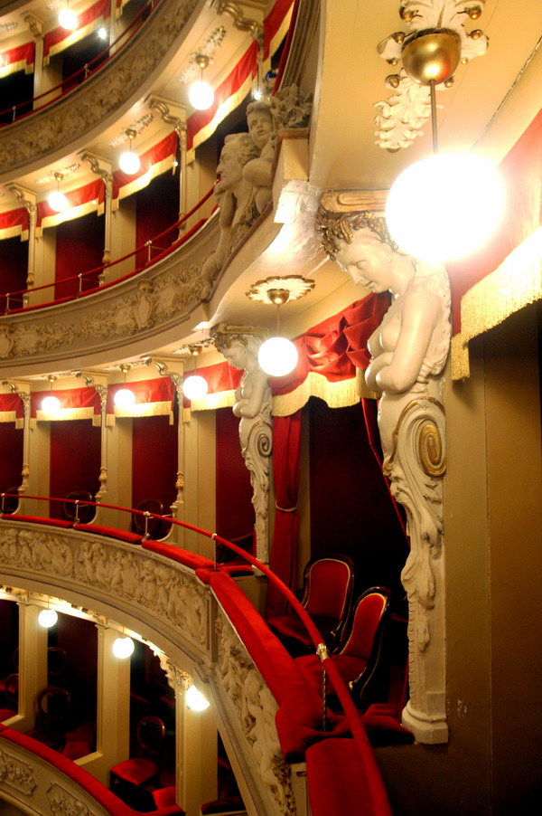 Particolare della sala del Teatro Vittorio Alfieri di Asti